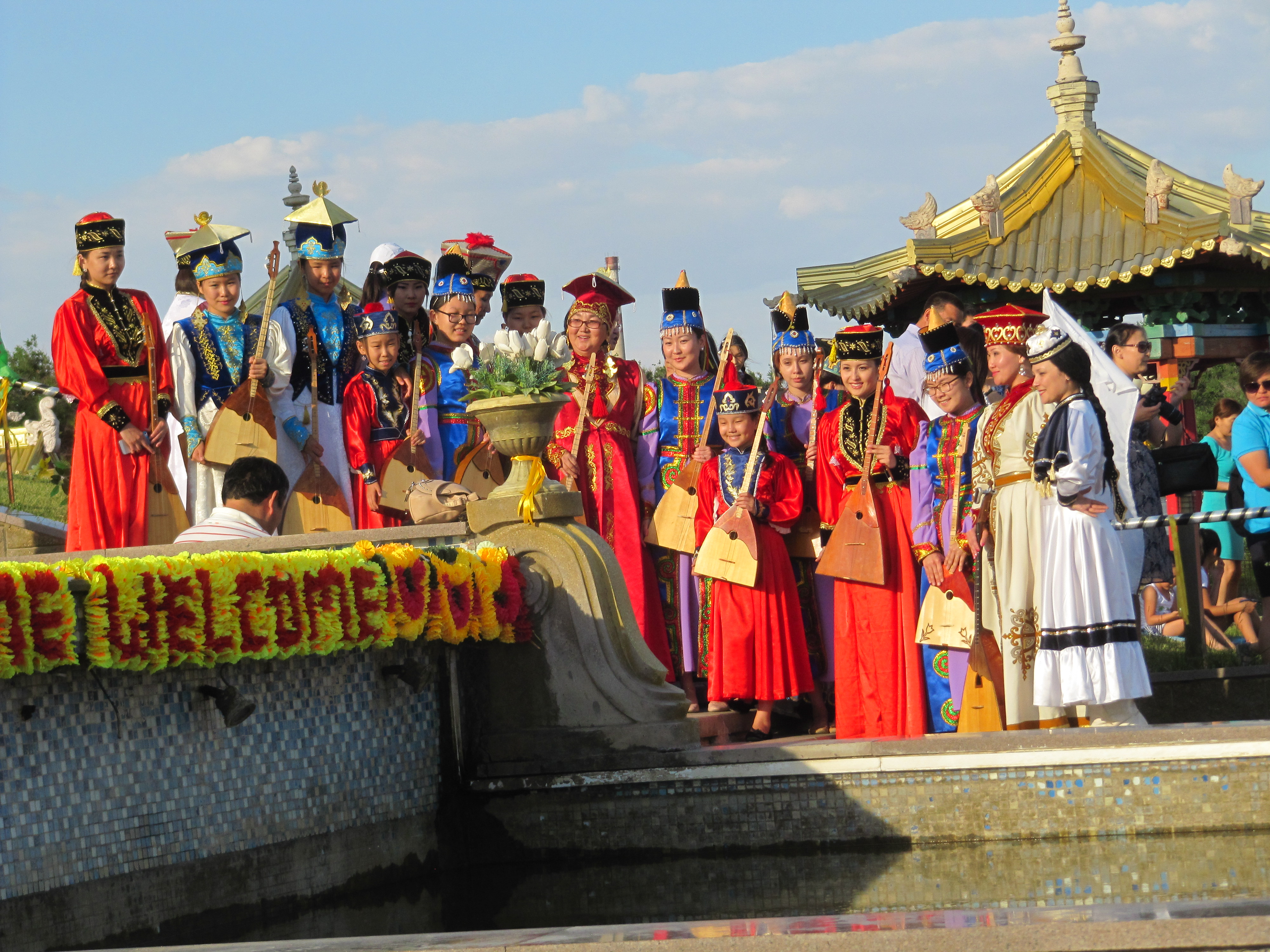 Домбристы в национальных калмыцких костюмах. Сводный концерт домбристов.